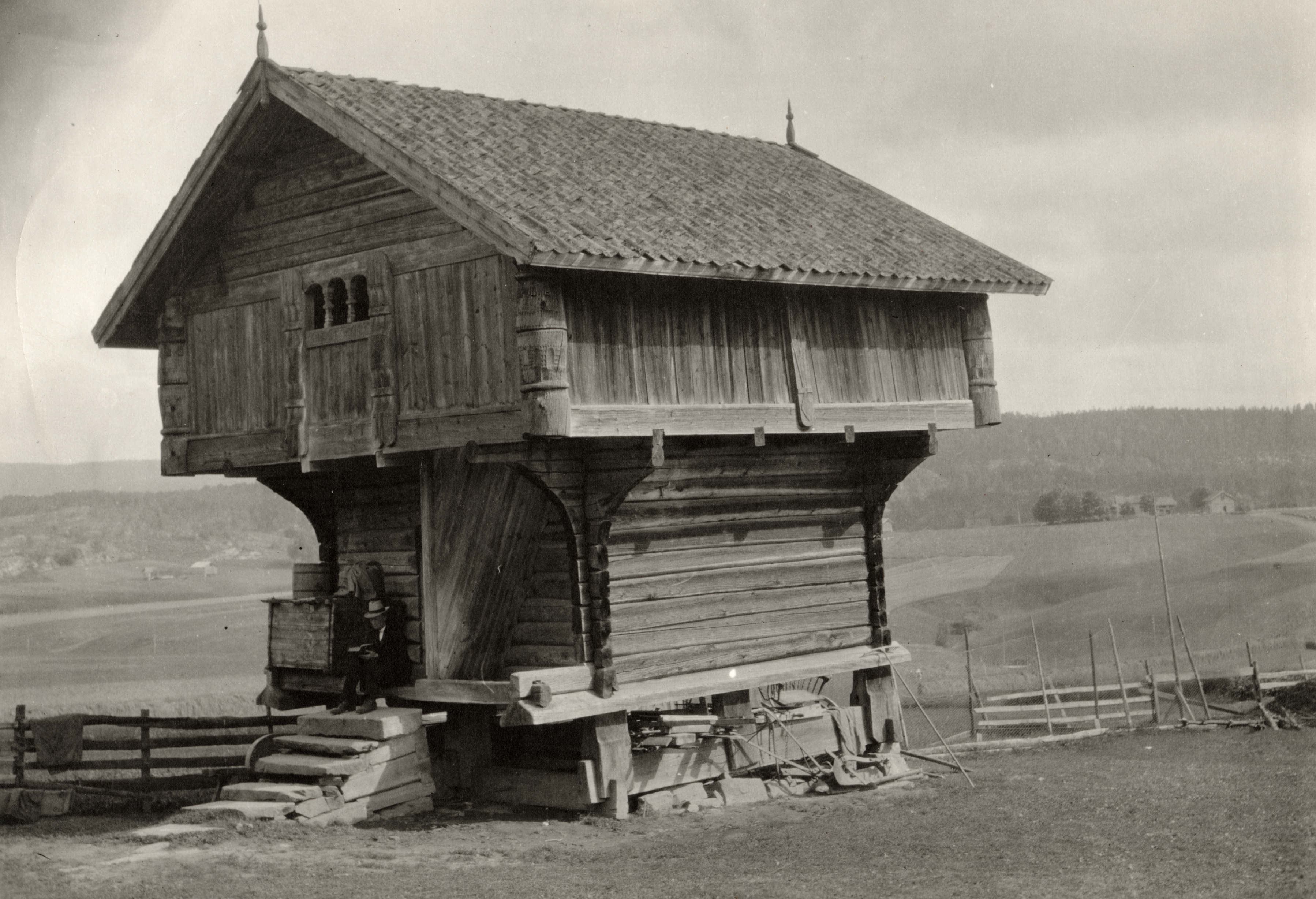 Forberget Suigard i Bø, Telemark, Telemark This image on crowdsourcing geotagging platform Fotodugnad